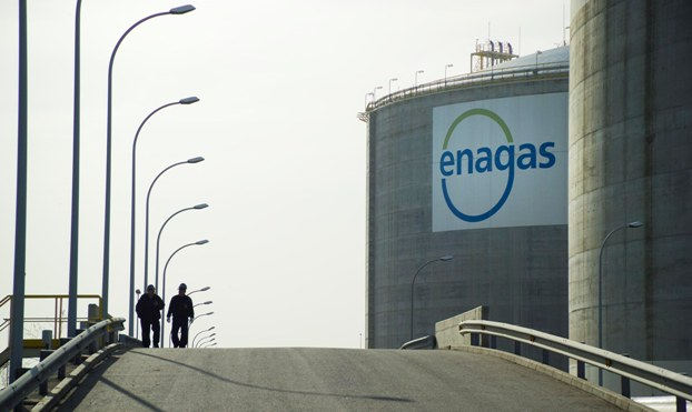 Enagás dia